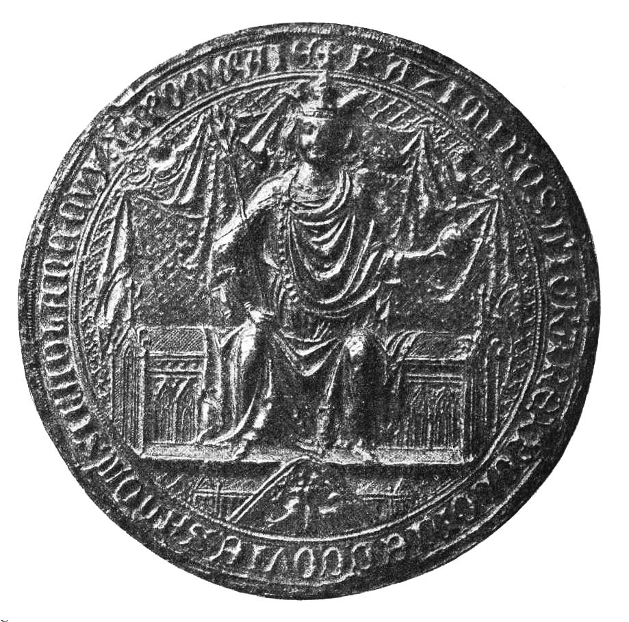 grafika do książki